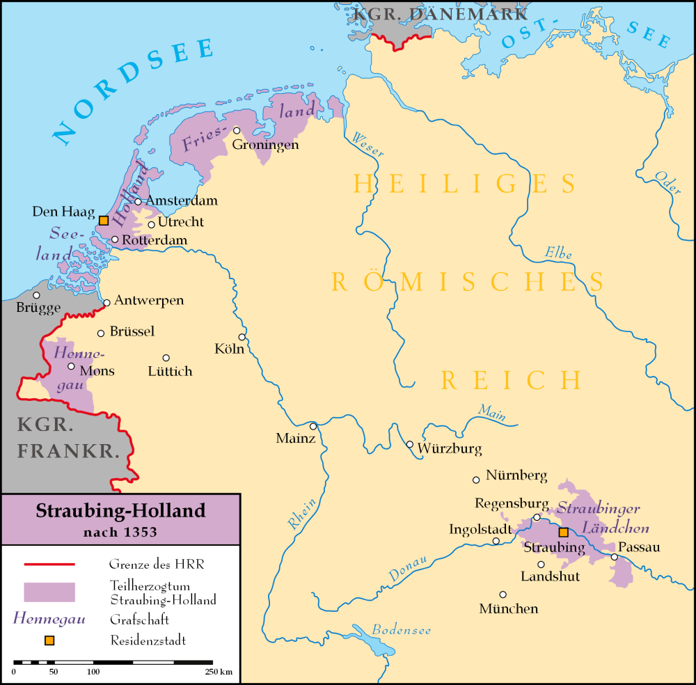 Bavaria-Straubing (Straubing-Holland) after 1353